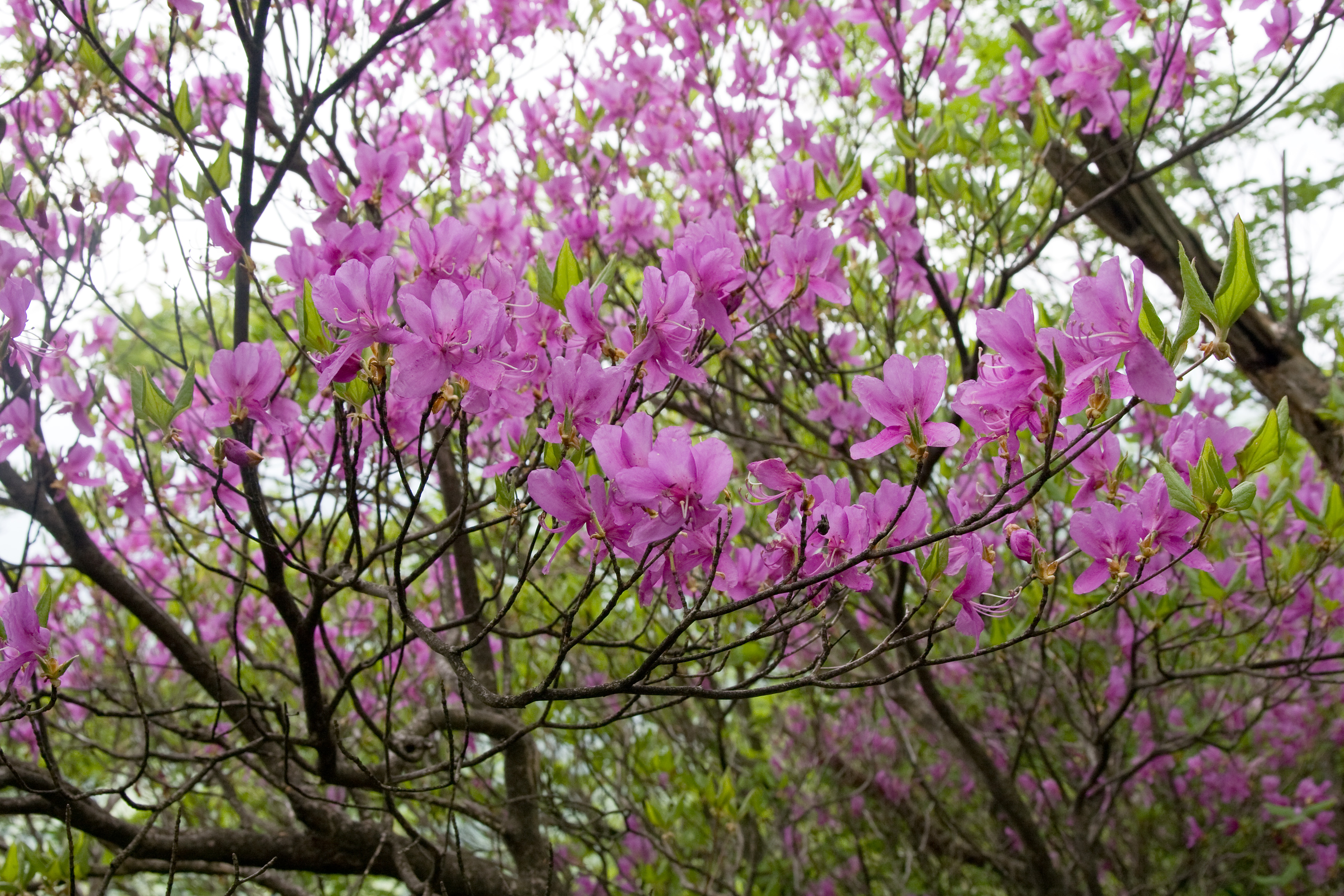 トウゴクミツバツツジ (学名:Rhododendron wadanum)